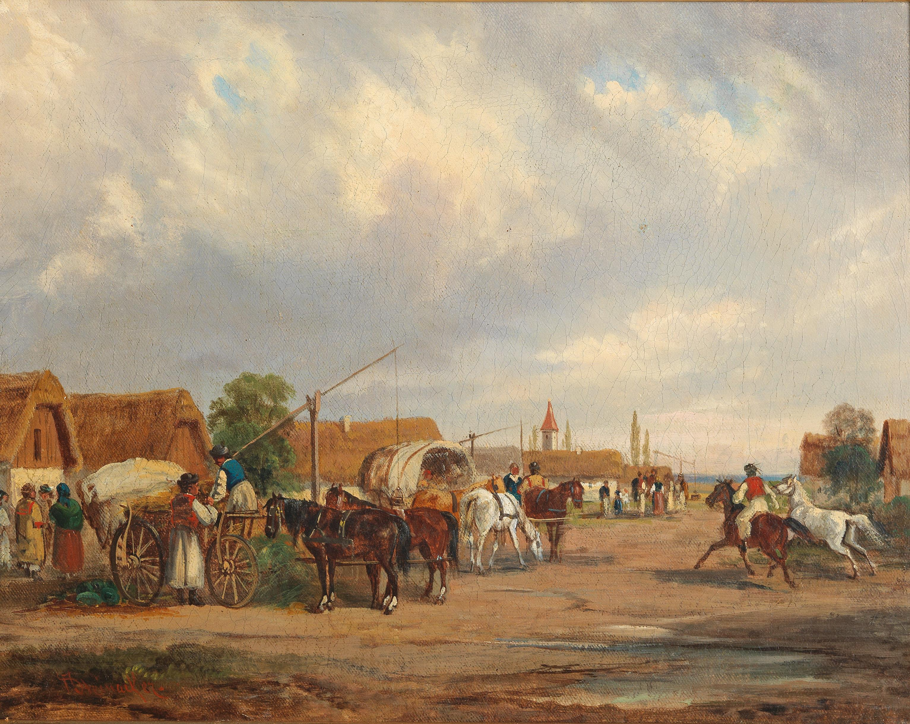 Ungarisches Dorf, signiert A. Steinacker (ligiert), Öl auf Holzplatte, 38,2 x 48,7 cm